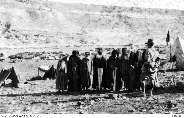 מייג'ור ג'נרל אדוארד צ'ייטור בפגישה עם בדואים בעבר הירדן